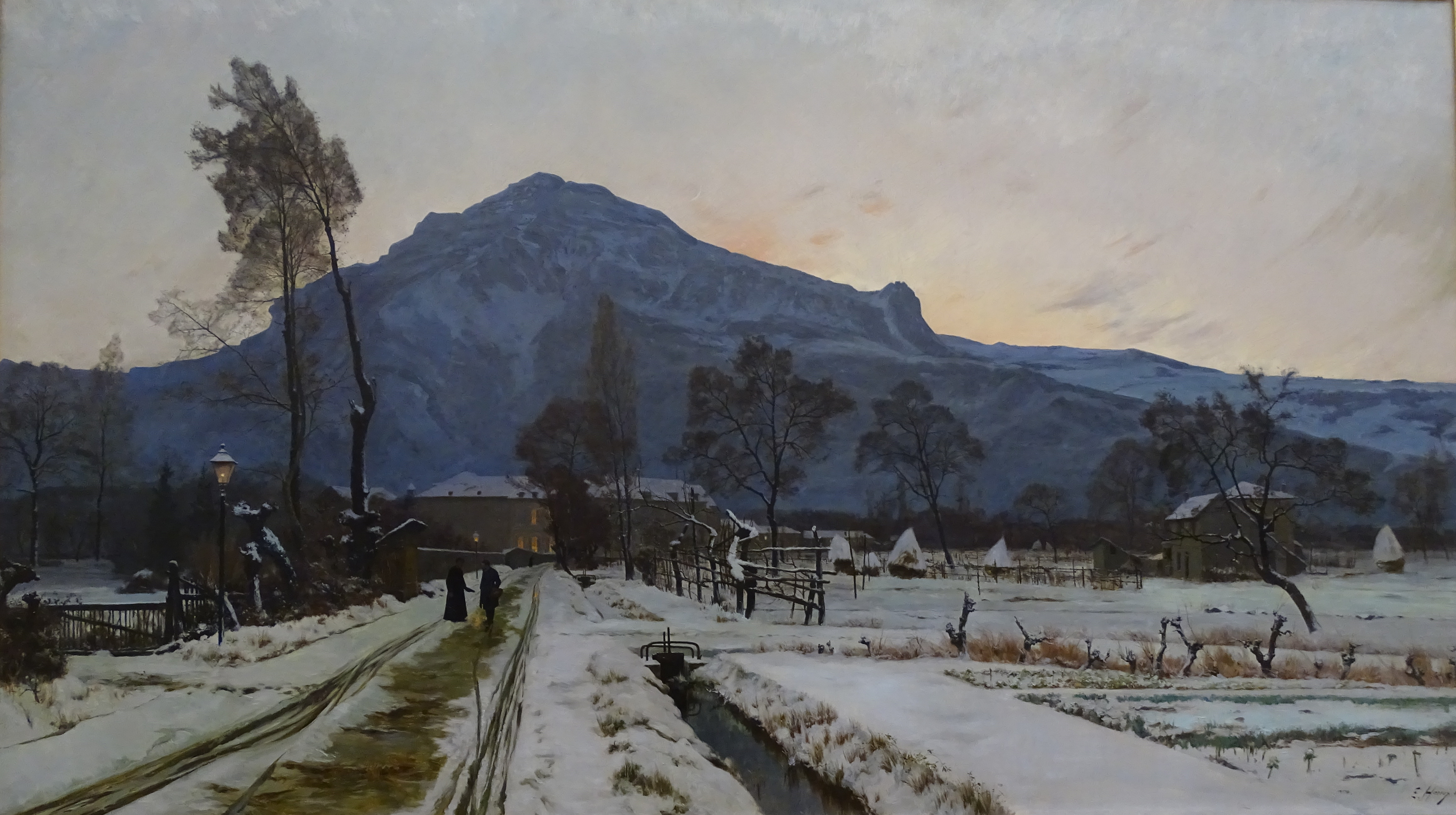 L'abbé Guétal et Ernest Hareux sur le chemin du petit seminaire du Rondeau